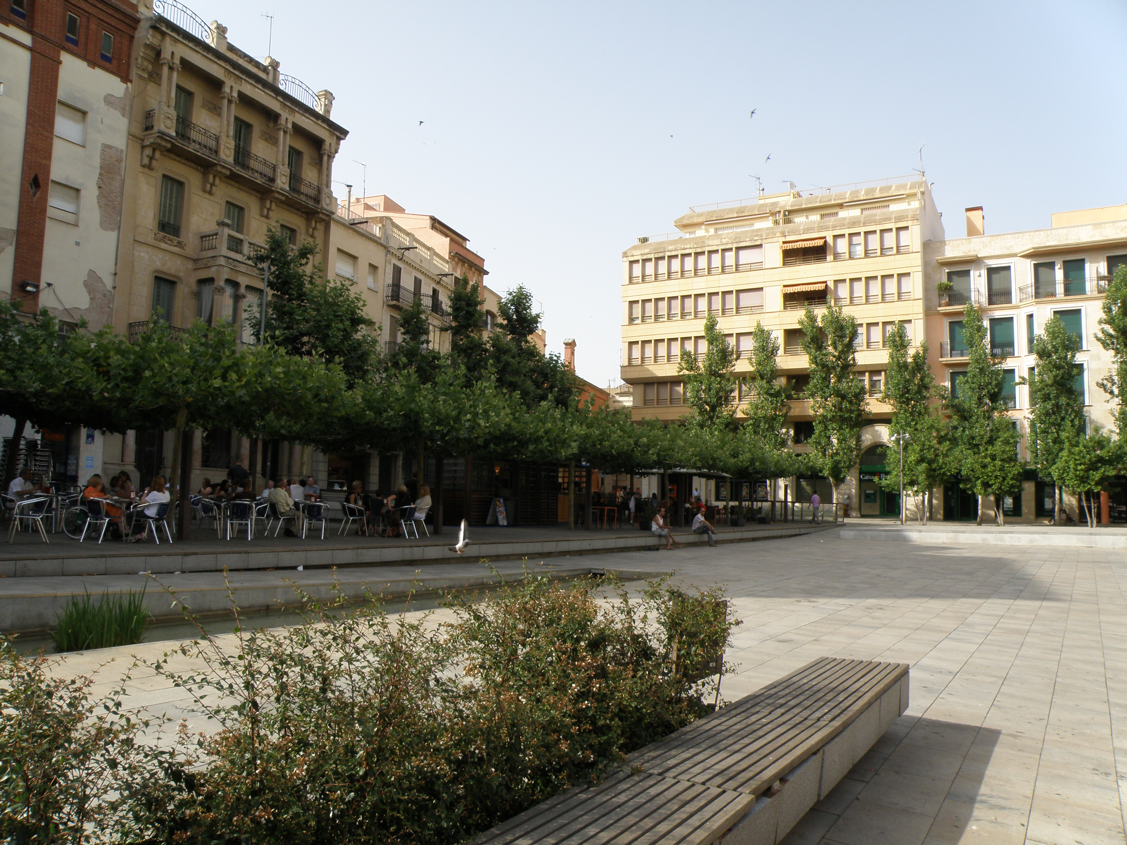 Plaça del Pati, Valls.